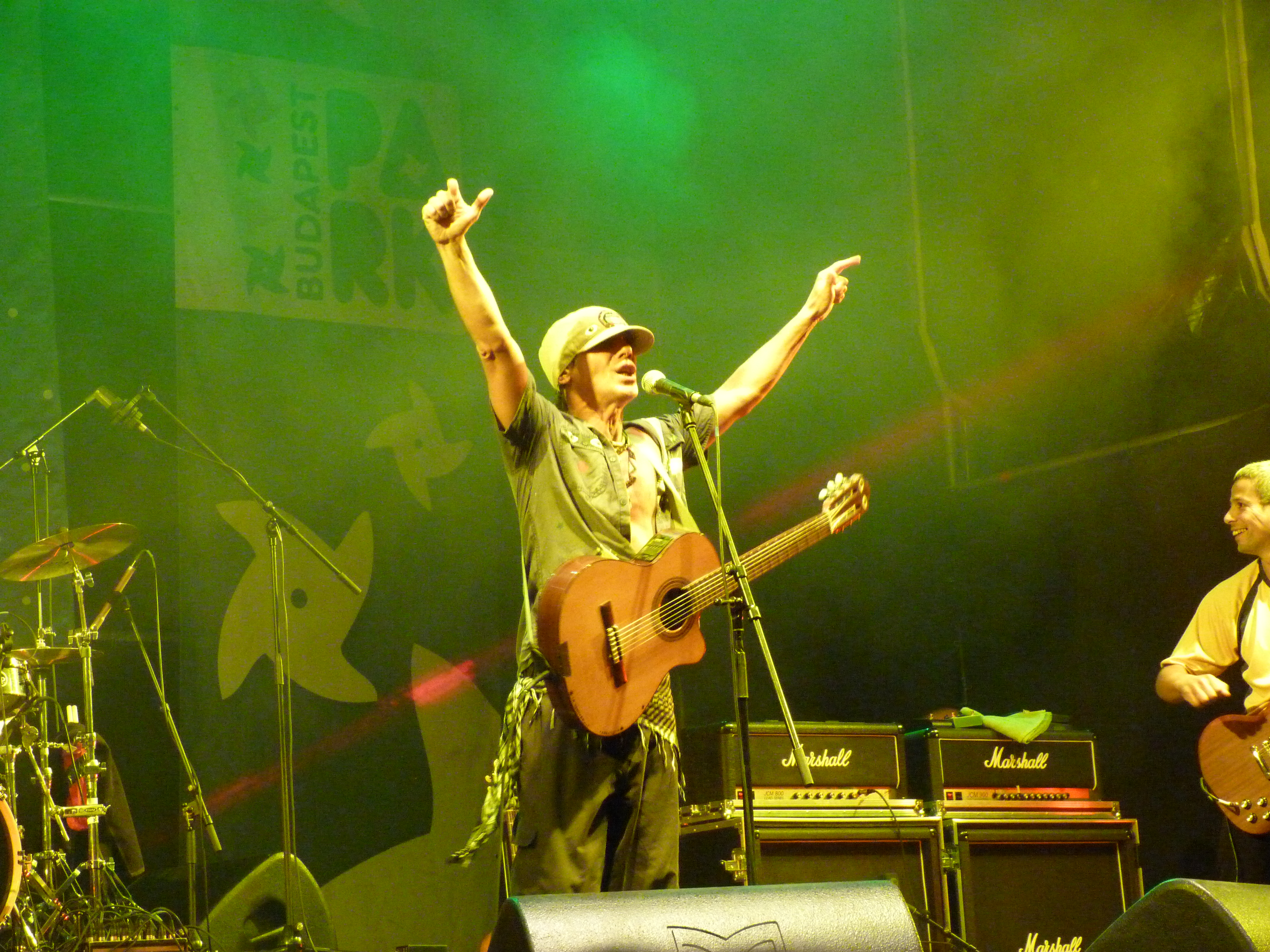 A felvétel 2013. szeptember 7 -én készült Budapesten, a Budapest Parkban (Budapest IX. Soroksári u. 60 szám). Manu Chao La Ventura. A kiváló hangulatú estén Manu nagyon sok ráadást játszott a lelkes közönségnek. José-Manuel Thomas Arthur Chao szülei emigráltak Franciaországba. Manu Párizs külvárosaiban szocializálódott, világzenét játszik. ©© Derzsi Elekes Andor, Budapest, 2013, You are authorised to use these photos and vids under Creative Commons – even for commercial, for profit purposes. Photos must be attributed to Derzsi Elekes Andor. All of the photos and vids in the Metapolisz DVD line are under Creative Commons and can be used even for commercial – for profit – purposes. Recommended Citation Derzsi Elekes Andor: Metapolisz DVD line Források: "Őrült Budapest!" – itt járt Manu Chao hozzáférés 20130910 Budapest Park hozzáférés 2013.0ö.10